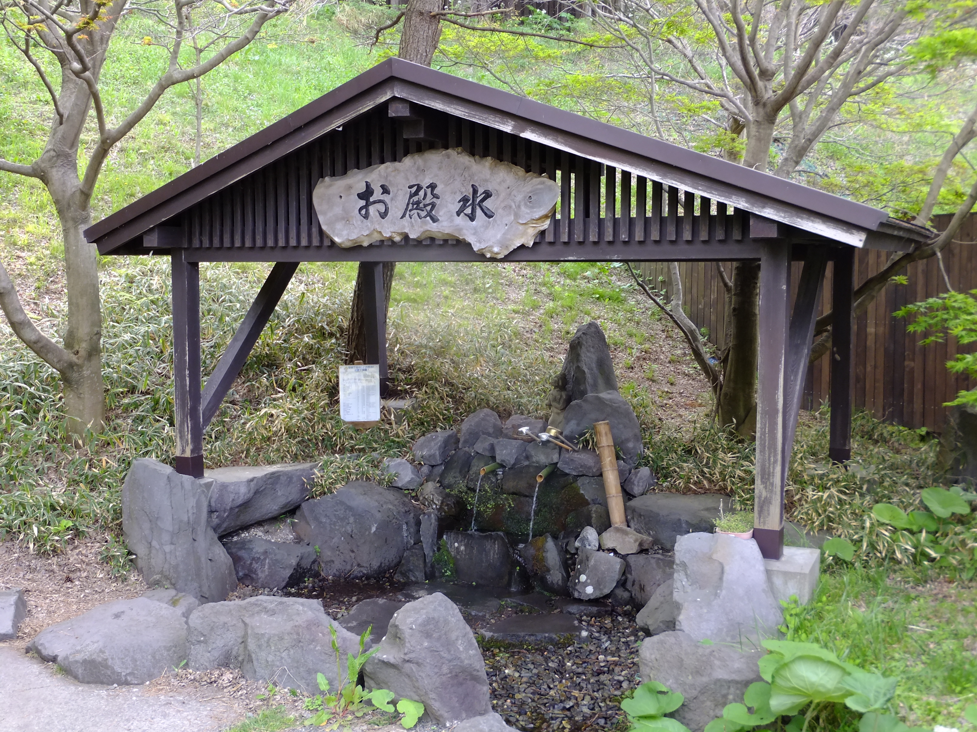 道の駅はちもり「お殿水」（秋田県八峰町）